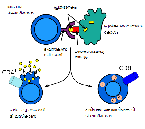 ടി-ലസികാണുവിനു സംസ്കരിച്ച പ്രതിജനകത്തെ സമർപ്പിക്കുന്ന പ്രതിജനകാവതരണ കോശം. പ്രതിജനകത്തെ സ്വീകരിണിയിലൂടെ ബന്ധിക്കുന്ന അപക്വ ടി-കോശം കോശവിഷകാരി ടി-ലസികാണുവായോ സഹായി ടി-ലസികാണുവായോ പരിപക്വപ്പെടുന്നു. ഇവ രണ്ടിനെയും വ്യത്യസ്ത കോശസ്തര മാംസ്യതന്മാത്രകളുടെയും (ചിത്രത്തിൽ സിഡി 4+, 8+ എന്ന് കാണിച്ചിരിക്കുന്നു) സ്വീകരിണികളുടെയും സാന്നിധ്യം കൊണ്ടു തിരിച്ചറിയാം.